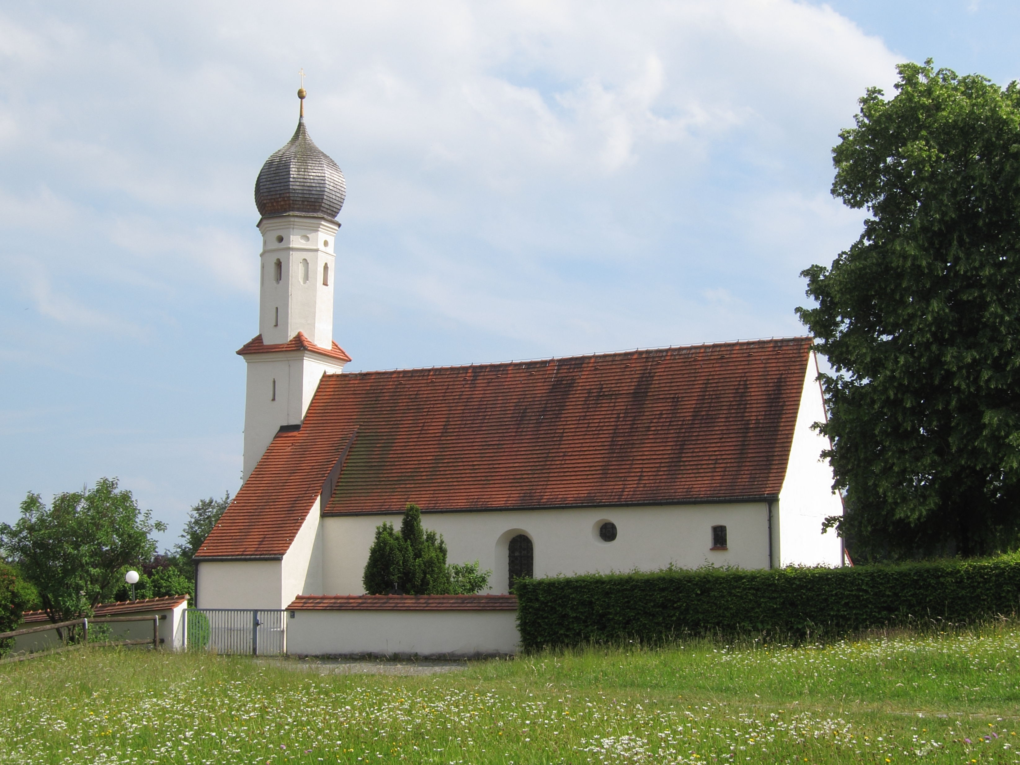 St.-Coloman-Straße 32; katholische Filialkirche St. Coloman, Langhaus im Kern spätromanisch, Ausbau der Kirche um 1500, barockisiert im 18. Jahrhundert.